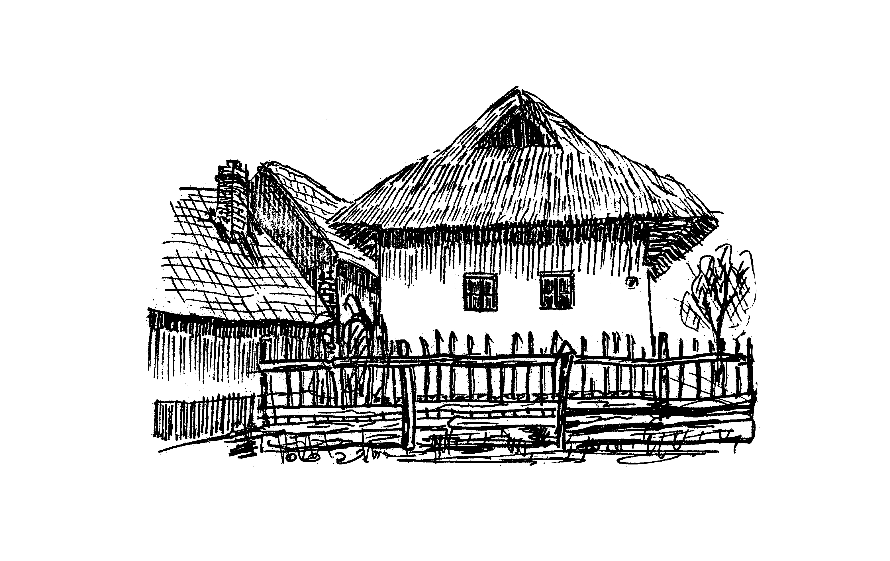 Orosz László - Aszalói Krónika (Aszaló, 1970) Grafika: Szilágyi Dezső